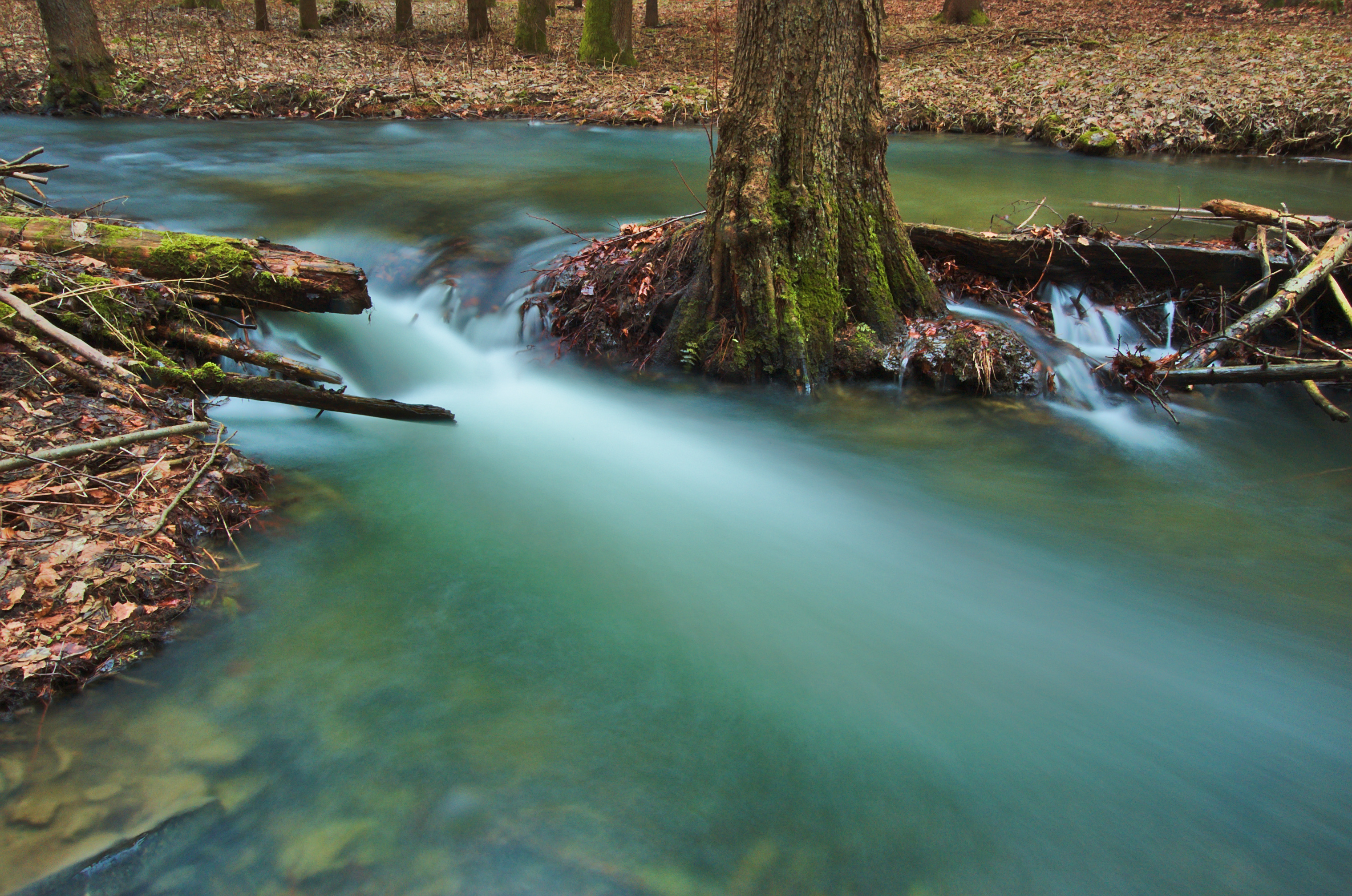 Zábrana v údolí mezi Lipovským mlýnem a Malým Hradiskem, okres Prostějov